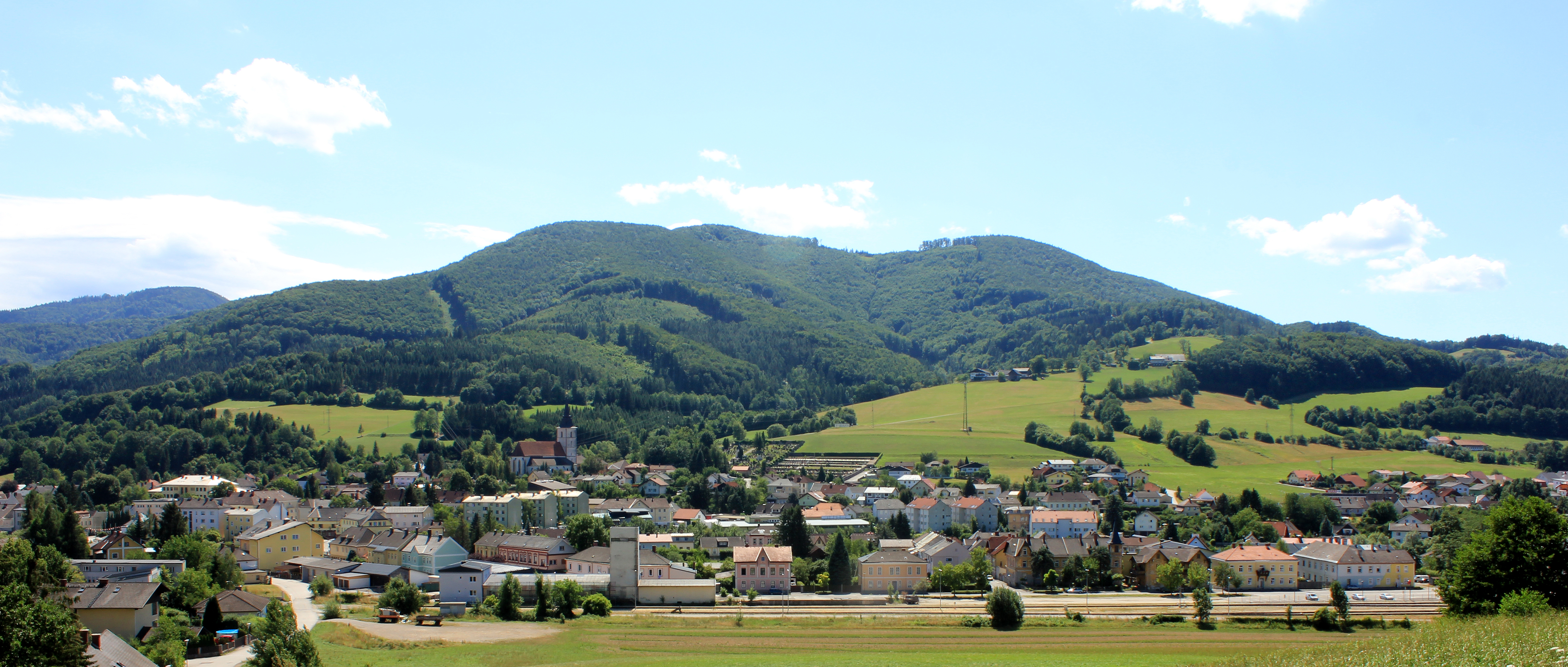 Stadt Hainfeld im Gölsental gelegen, im Hintergrund ist der Kirchenberg zu sehen.